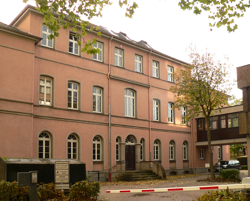 Amtsgericht Hameln